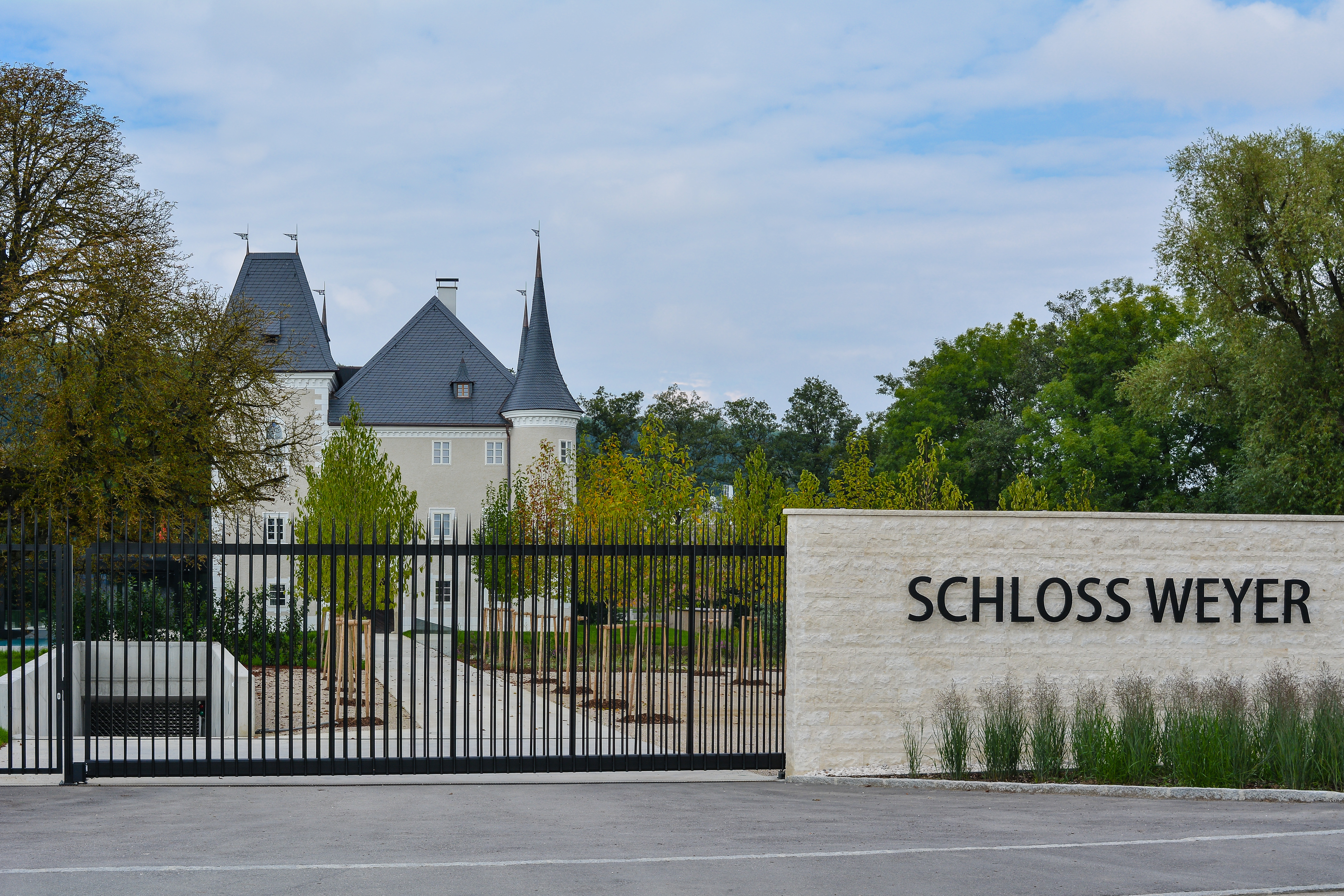 Schloss Weyer nach Abschluss der Renovierung 2014